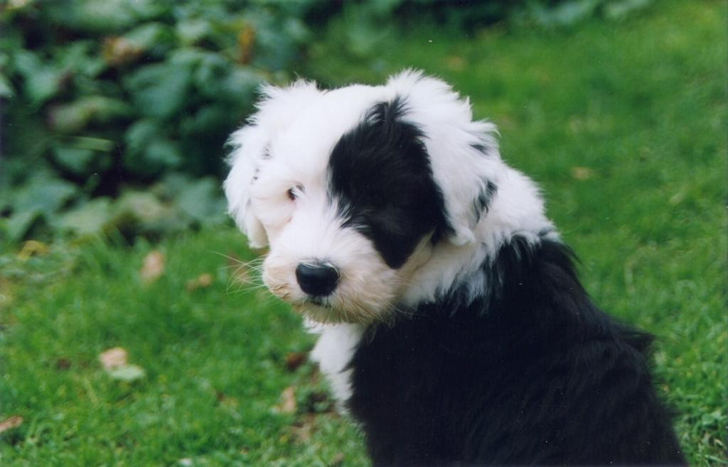 chiot bobtail